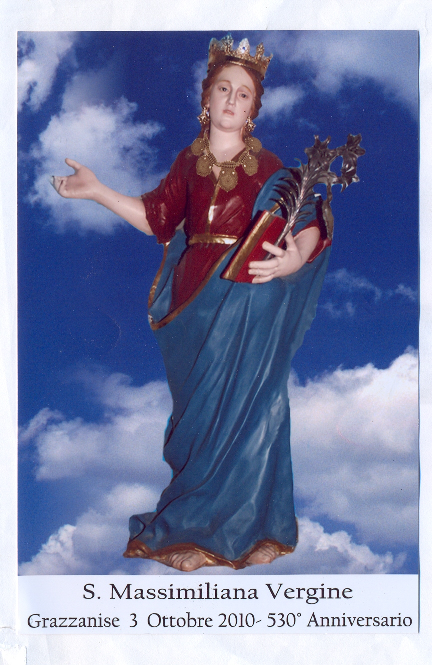 santa massimiliana vergine